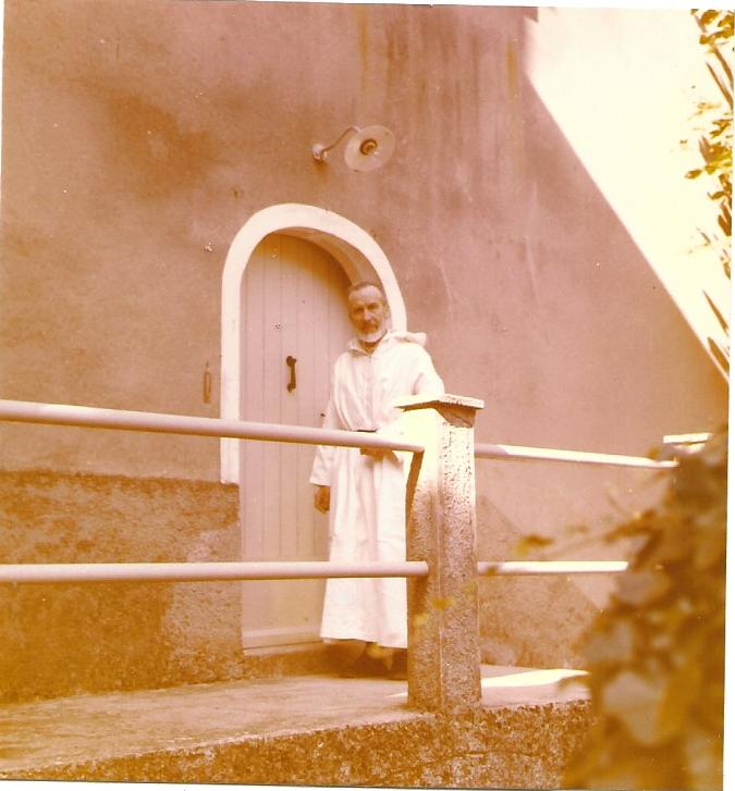 Le père Roger Henry à la fraternité de Villecroze